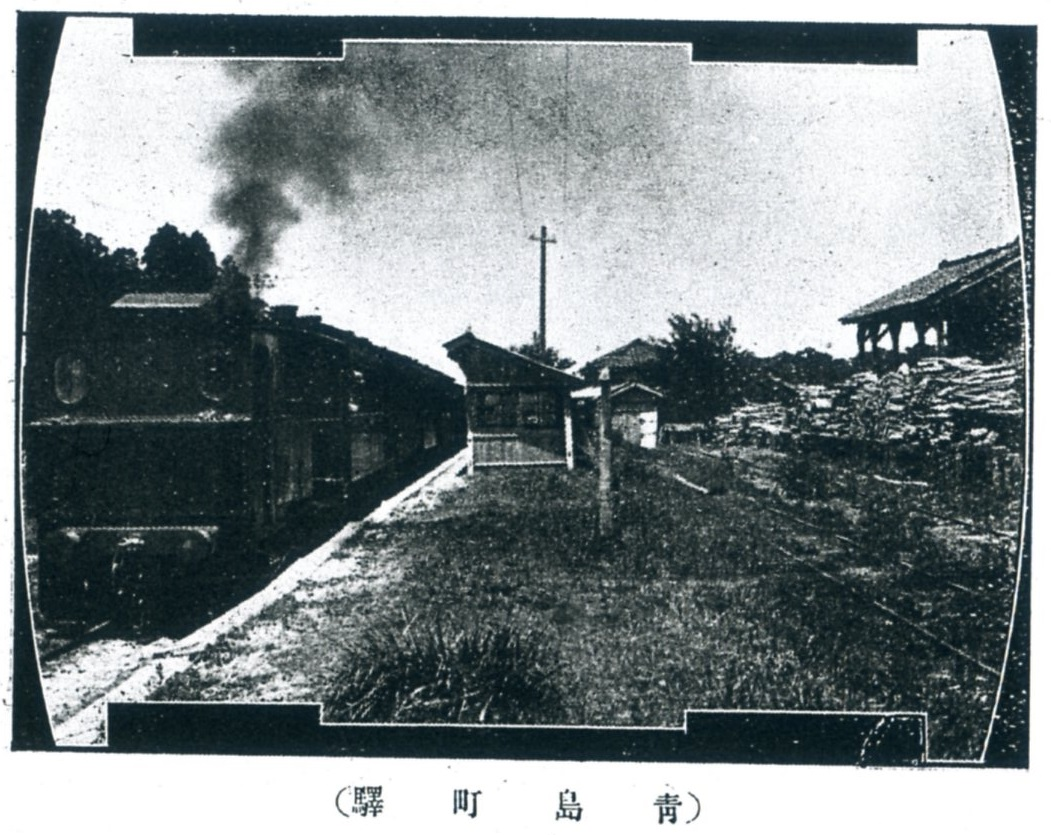 加越鉄道青島町駅